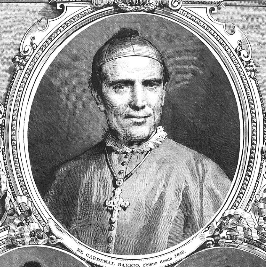 Cardenal Barrio, grabado de Ricardo Balaca. La Ilustración Española y Americana, 8 de febrero de 1874.